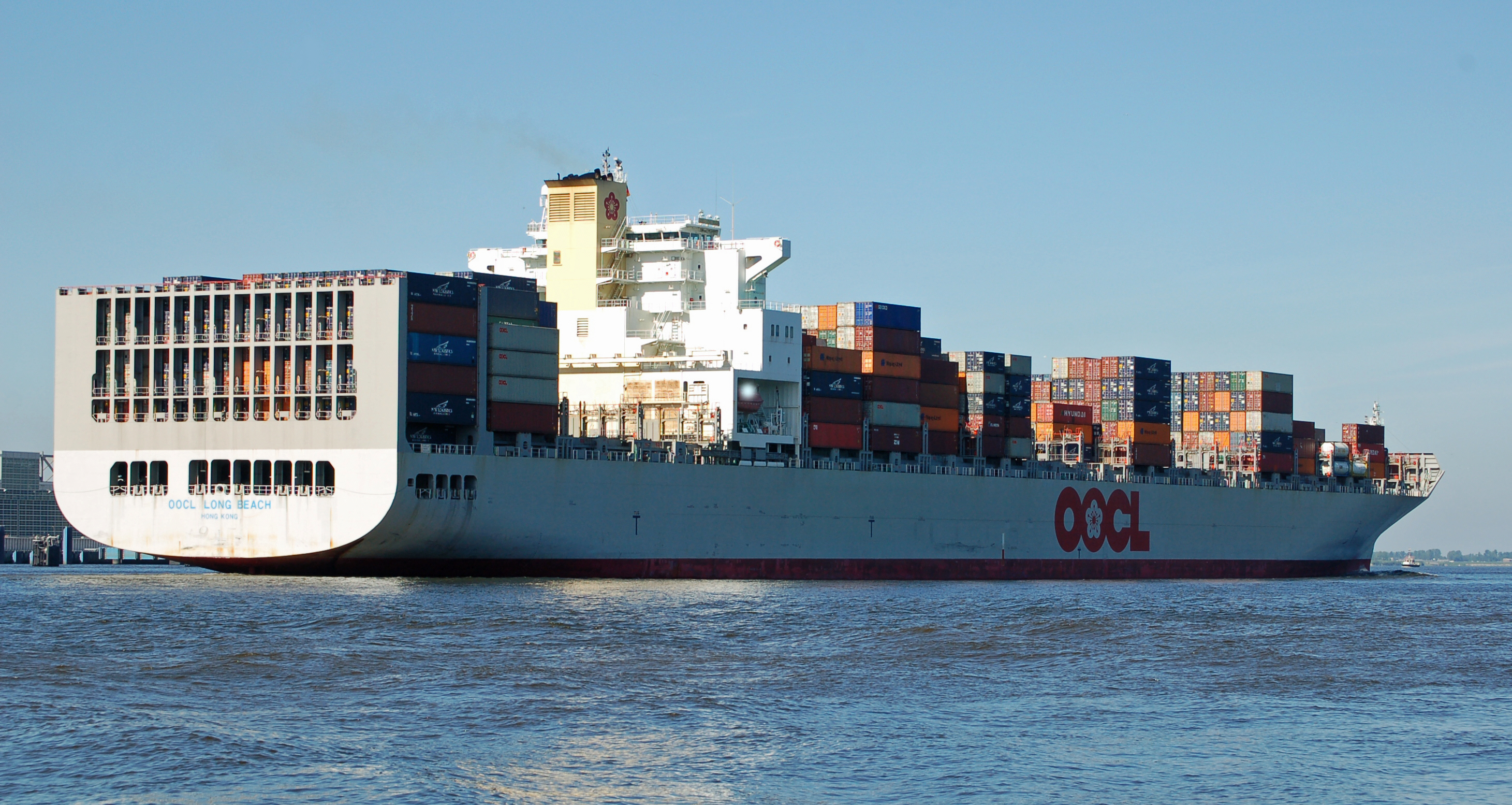 Das Frachtschiff OOCL Long Beach auf der Elbe IMO-Nummer: 9243409 MMSI-Nummer: 477316000 Rufzeichen: VRYO4 Länge: 323.0m Breite: 43.0m Flagge: Hong Kong